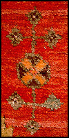 увеличенные кресты ковра